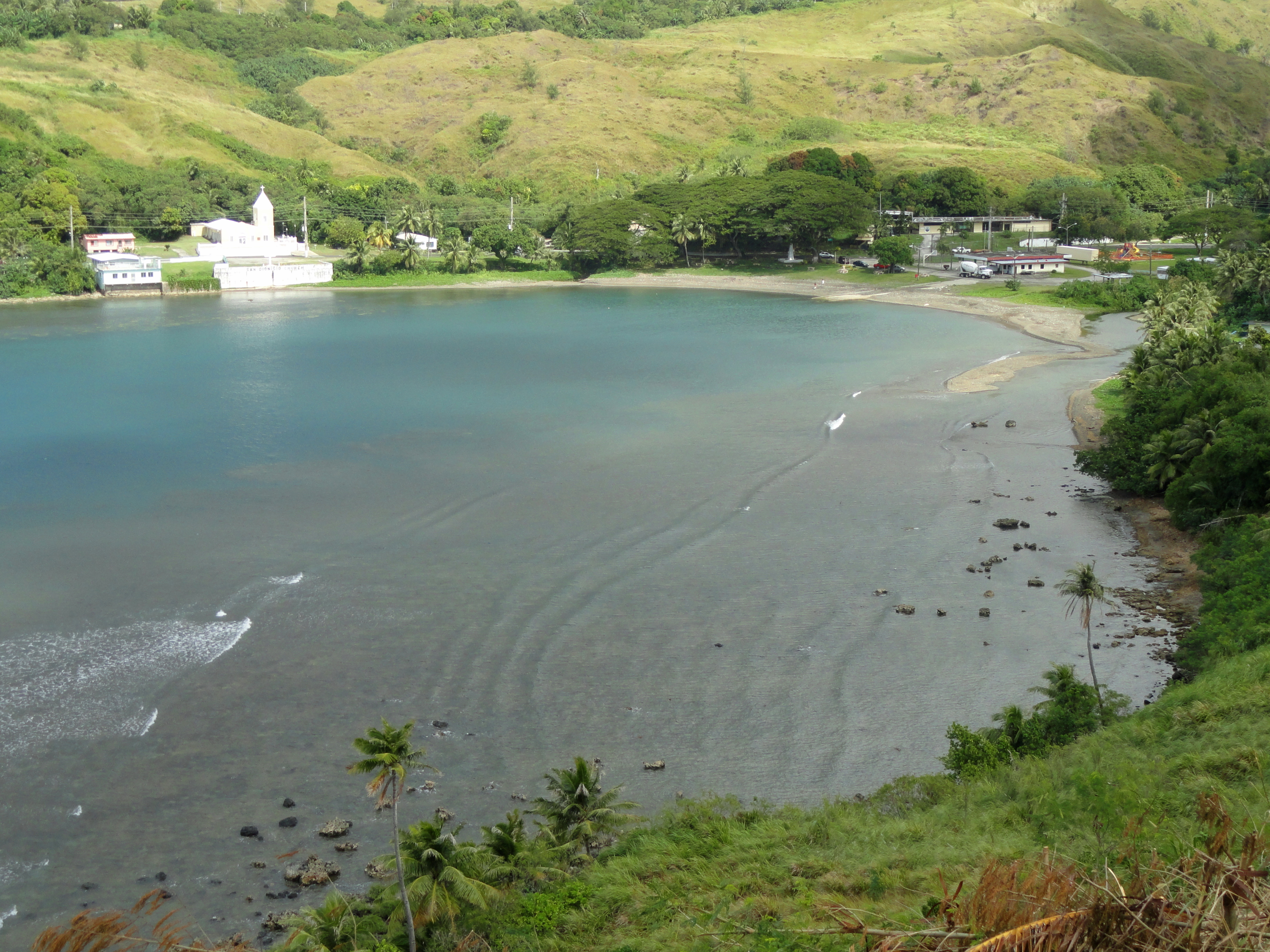 Umatac Bay, Umatac, Guam, USA.